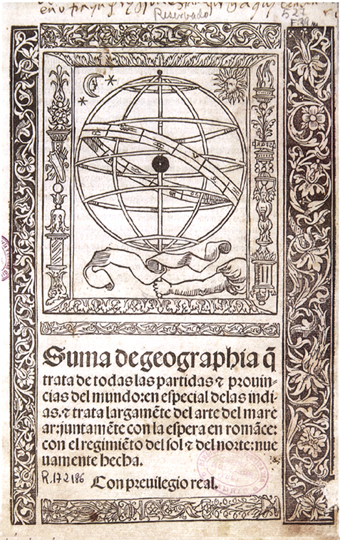 Libro de "Suma de Geographia de todas las partidas y provincias del mundo en especial de las Indias y trata largamente del arte de navegar, conjuntamente con la espera en romance, con el regimiento del Sol del Norte nuevamente hecha", de Martín Fernández de Enciso. Publicado en Sevilla en 1519 en la imprenta de Jacobo Cromberger.